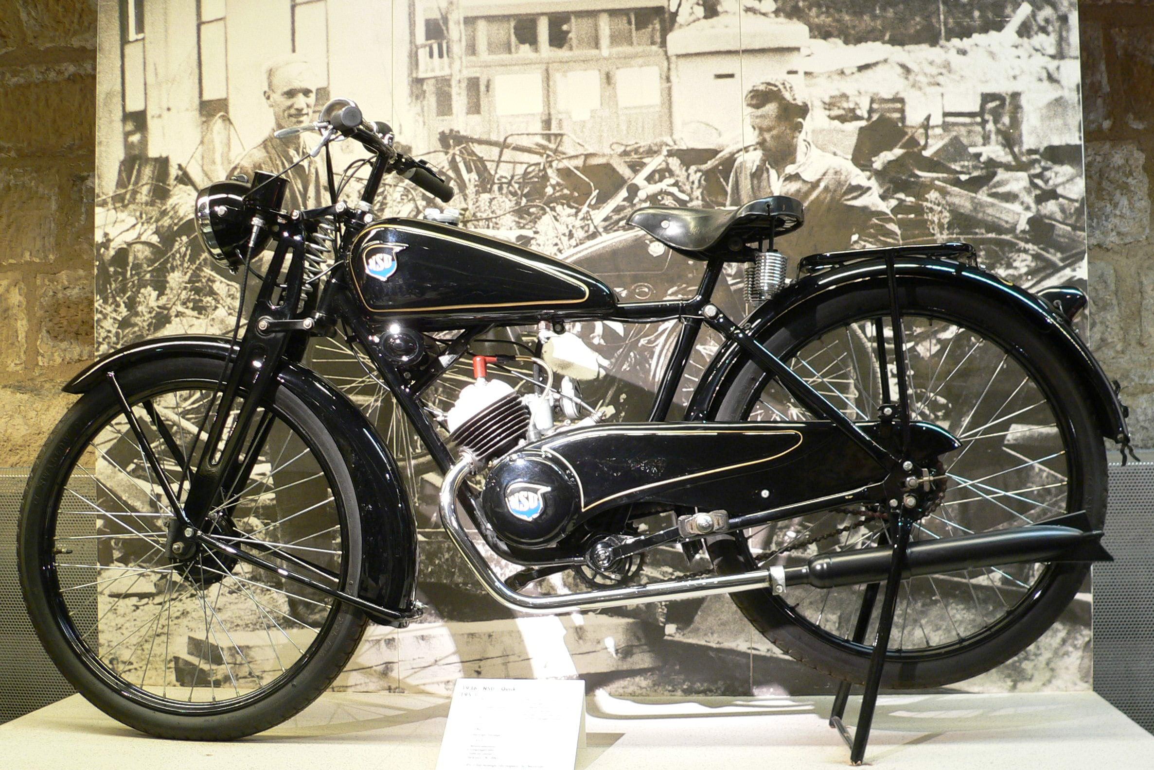 Motorbike "NSU Quick" (1950) at the Deutsches Zweirad- und NSU-Museum